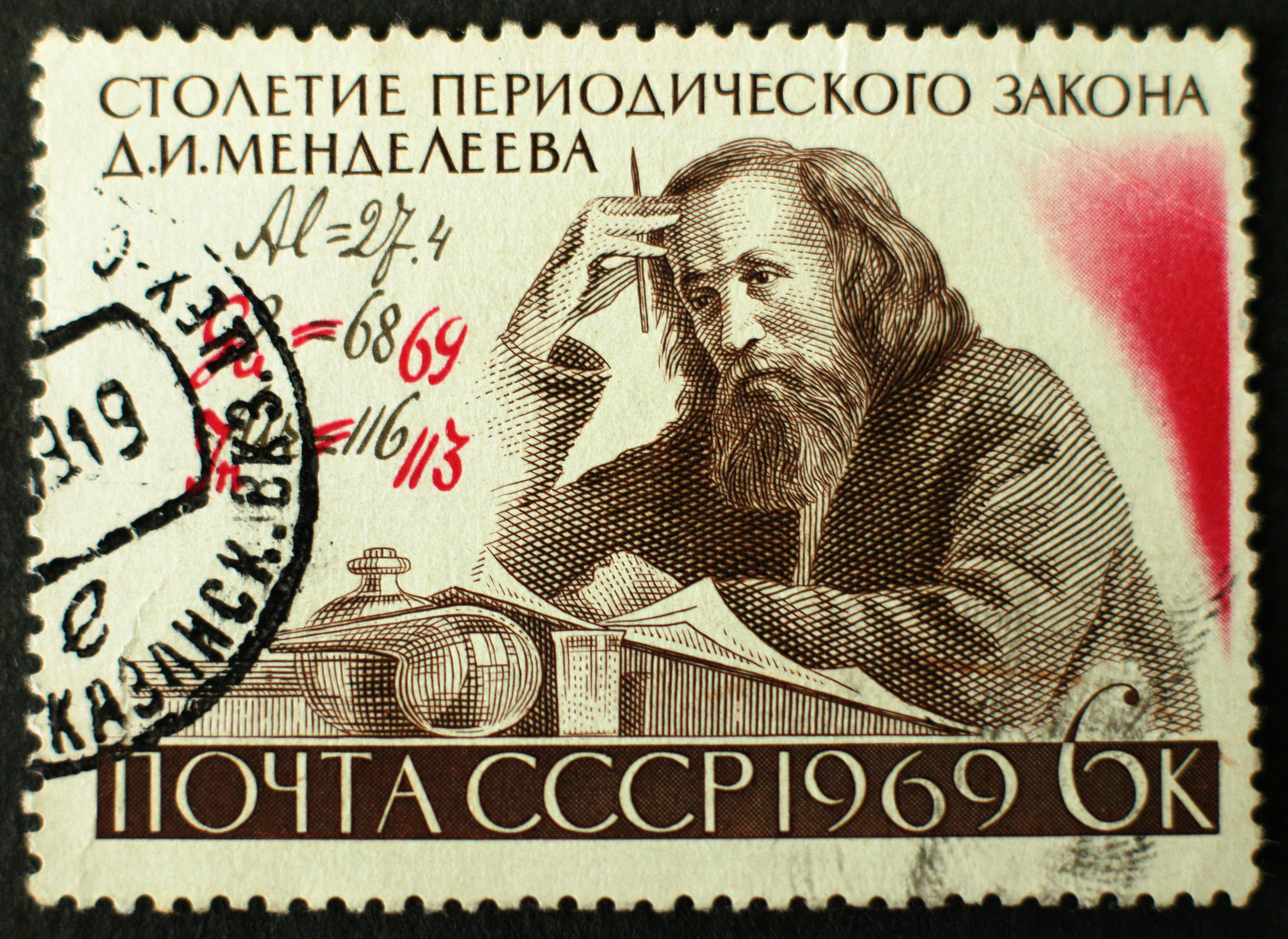 Briefmarke, Sowjetunion